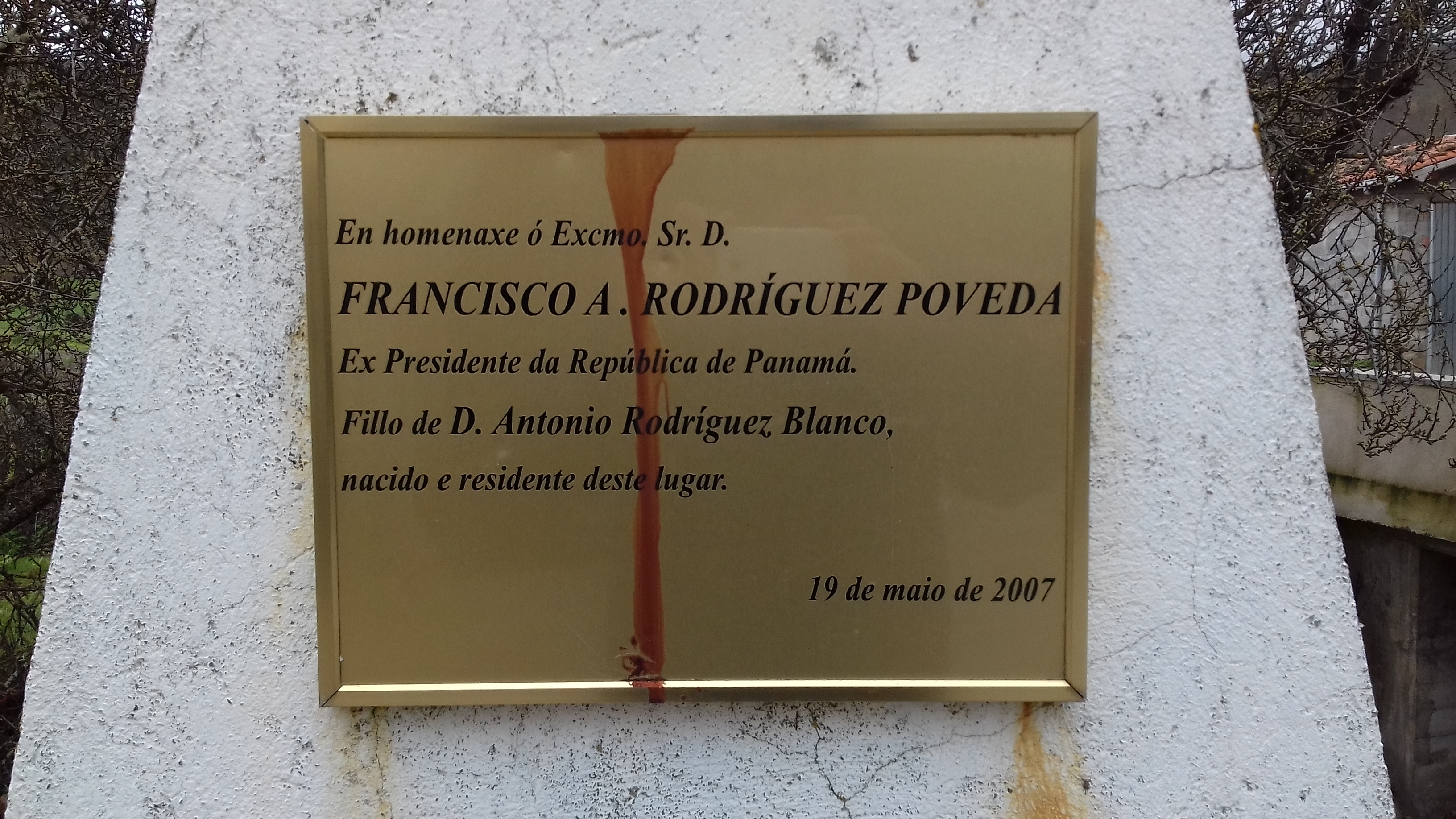 Placa en homenaxe a Francisco A. Rodríguez Poveda en Pradocabalos, Viana do Bolo